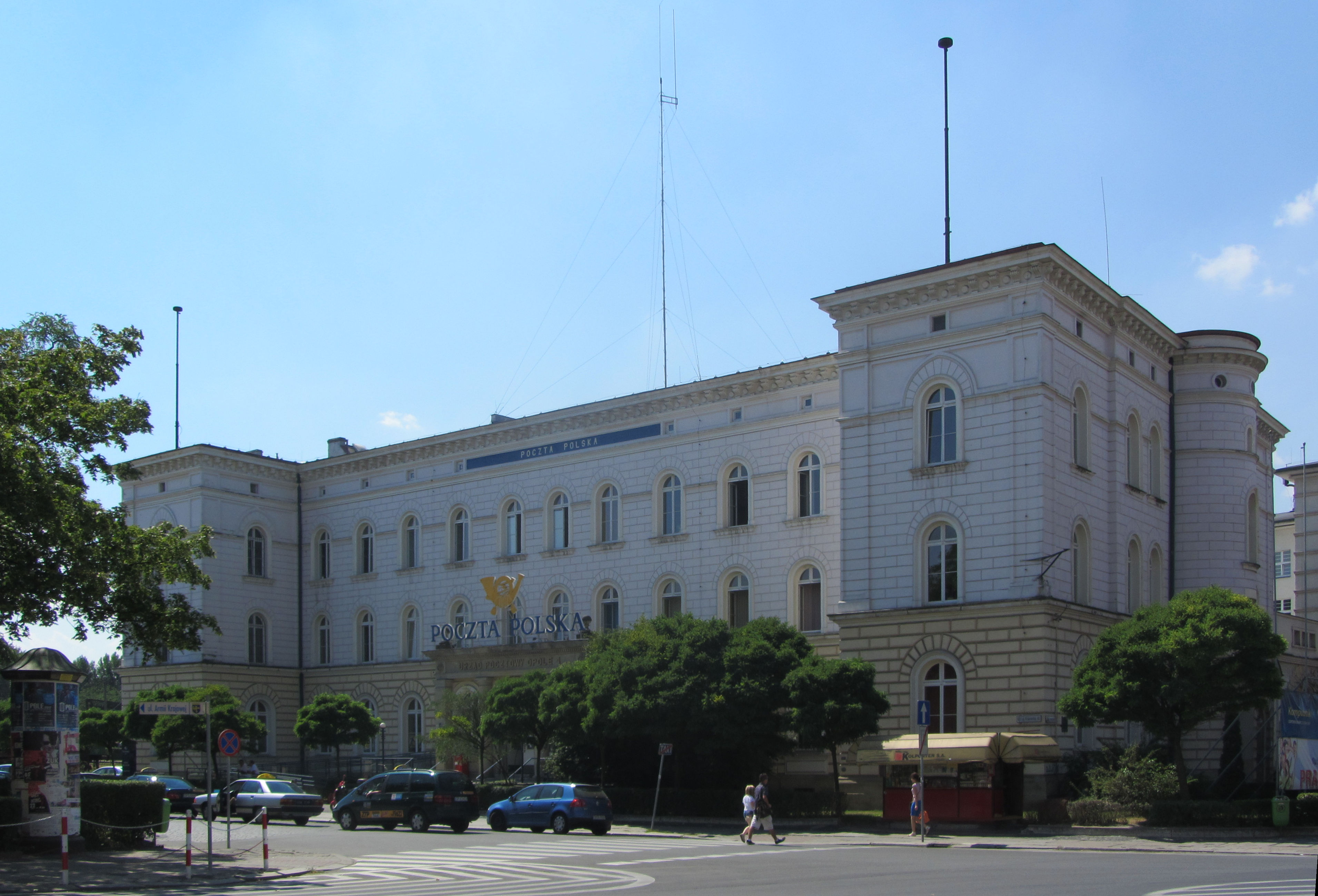 Opole, ul. Krakowska 46 - poczta, 1854